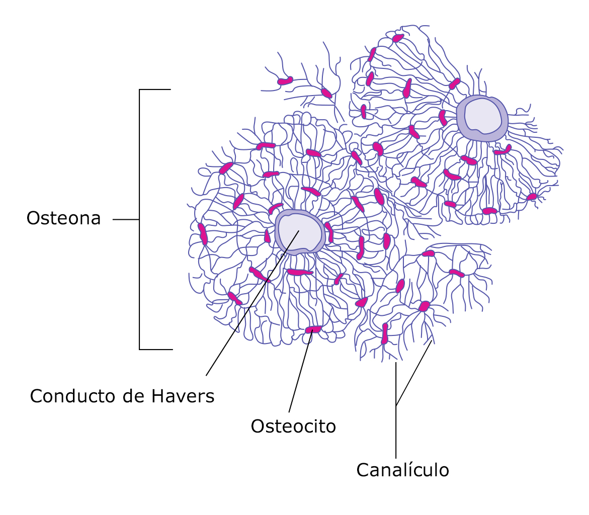 Esquema de la sección de hueso compacto.